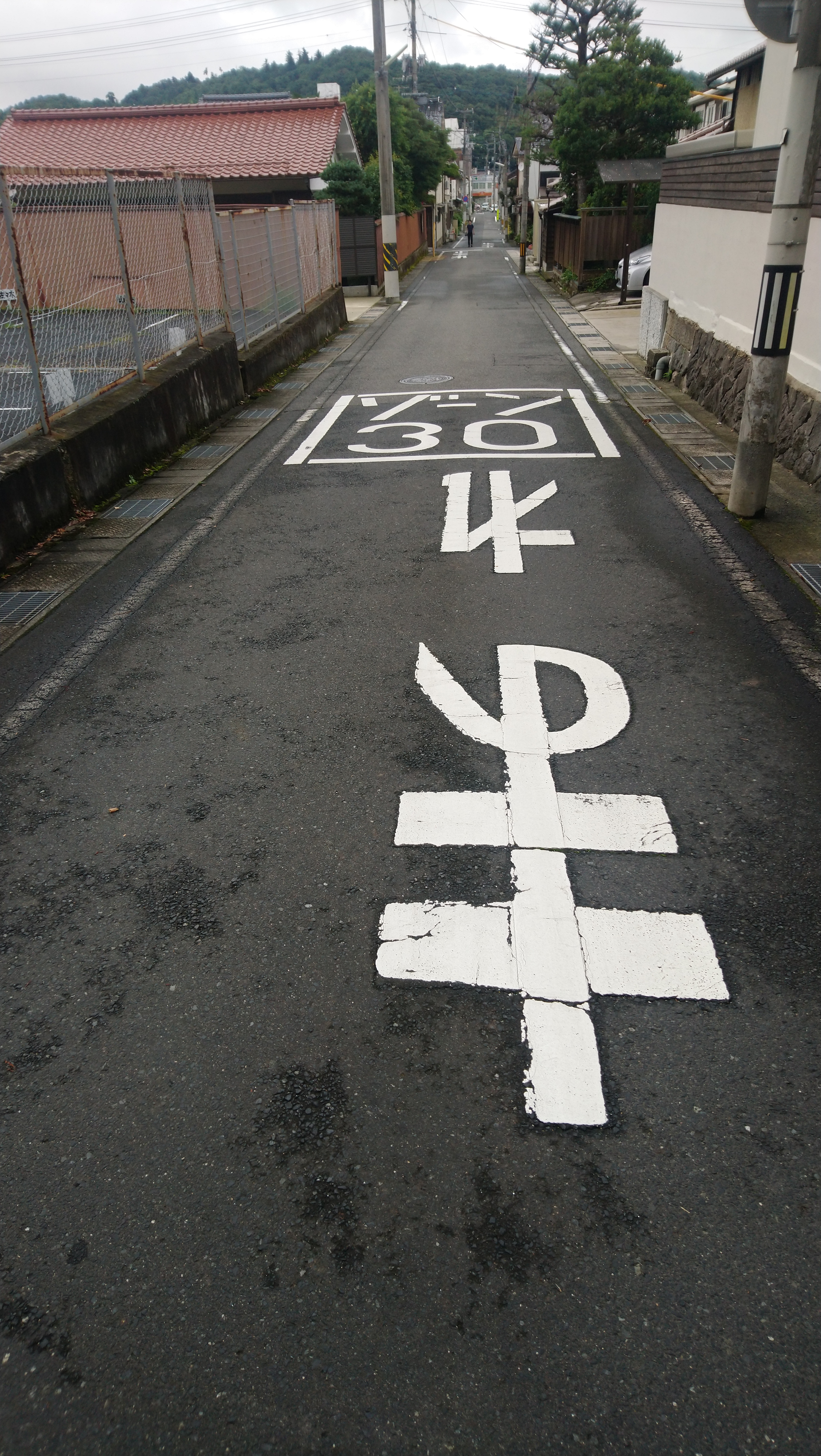 位於鳥取縣倉吉市道路的zone30